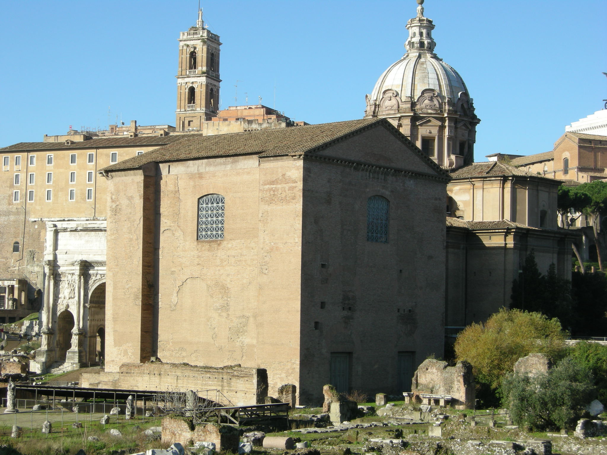 Curia iulia